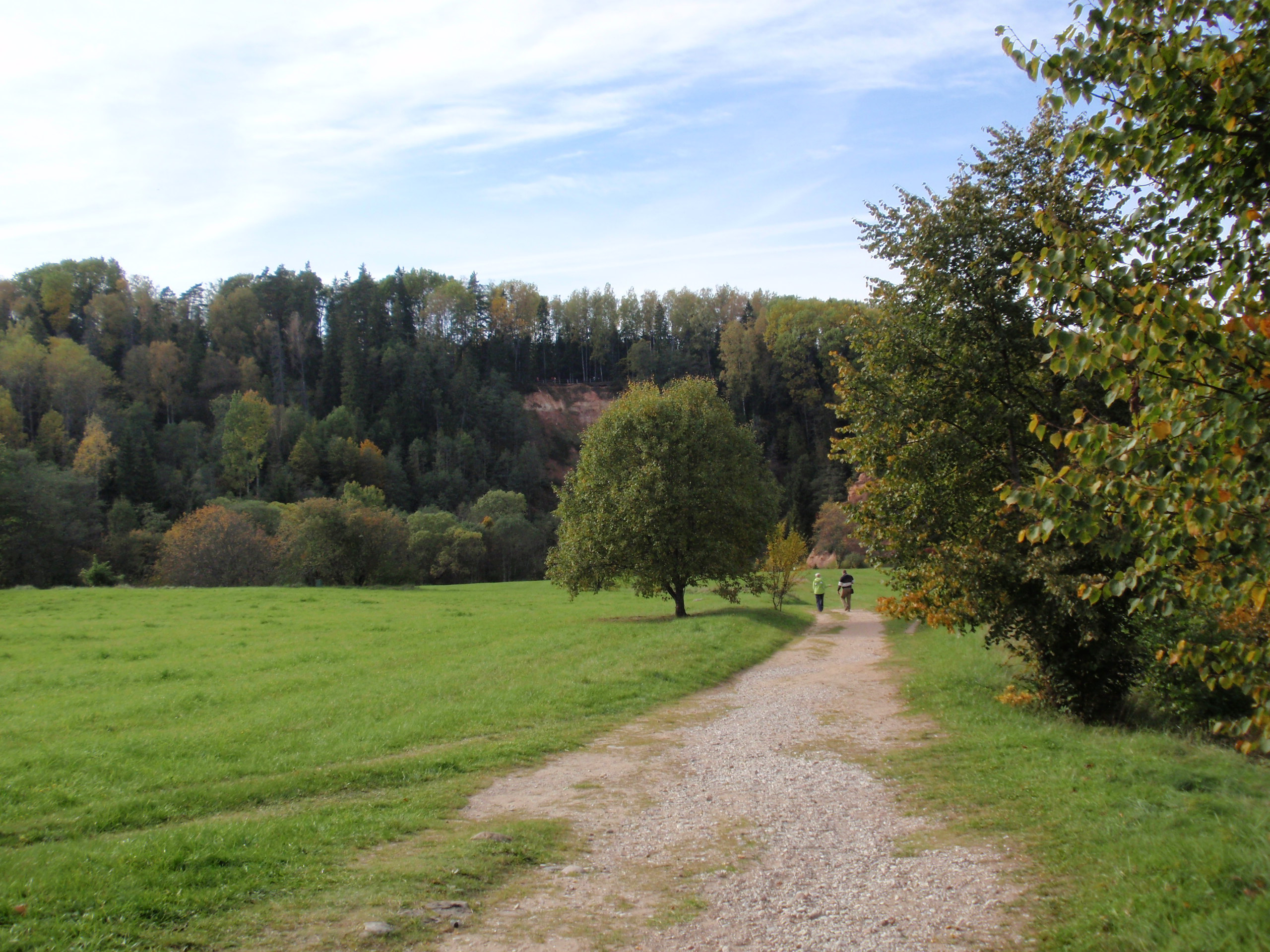 Path to Zvārtes iezis